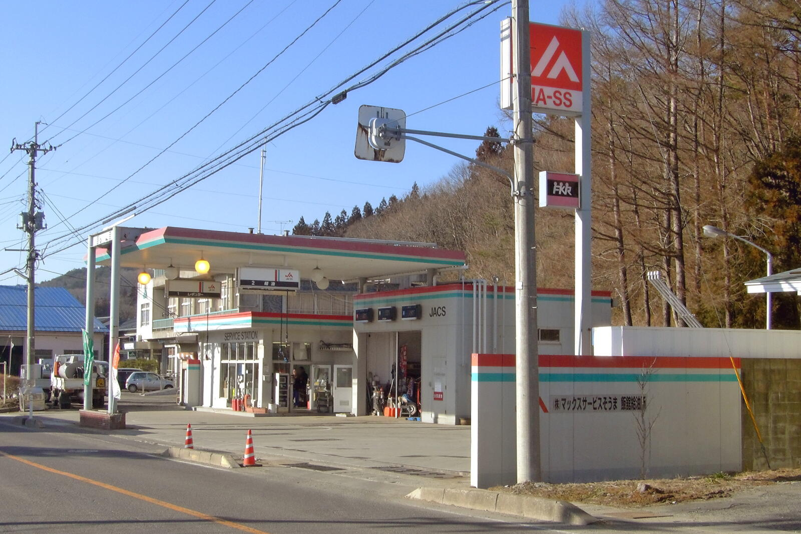 JA-SS飯館給油所